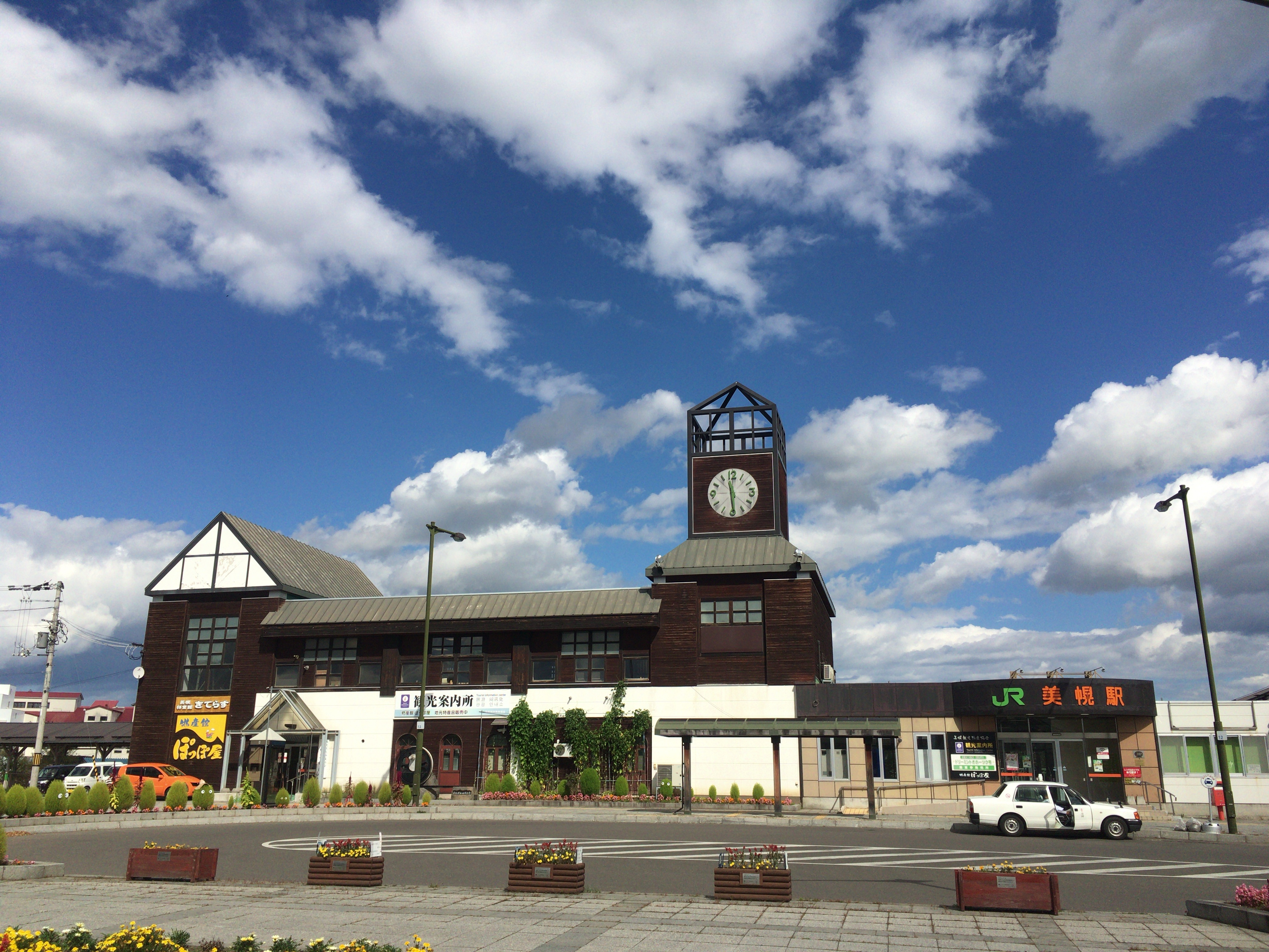 JR美幌駅の駅舎